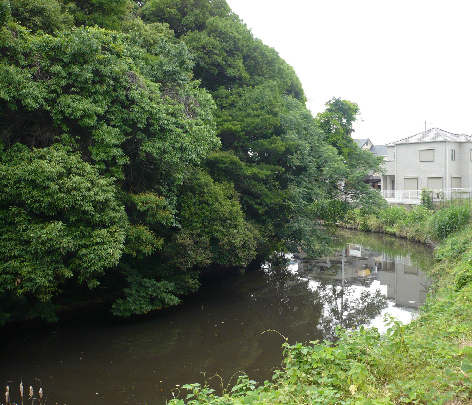 高屋城の本丸跡